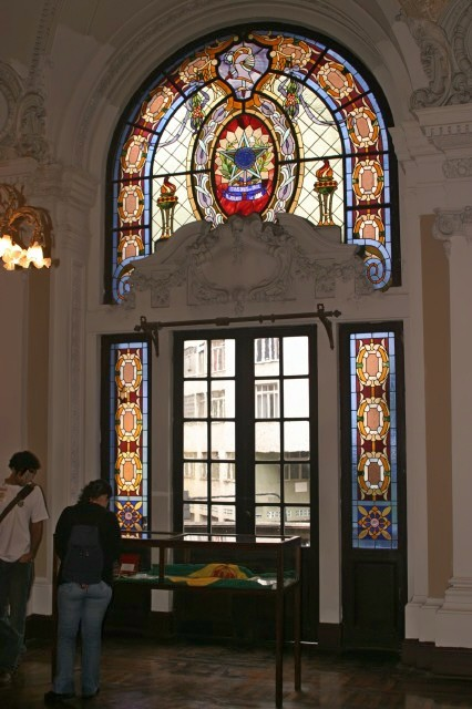 Museum of Rio de Janeiro Civil Police